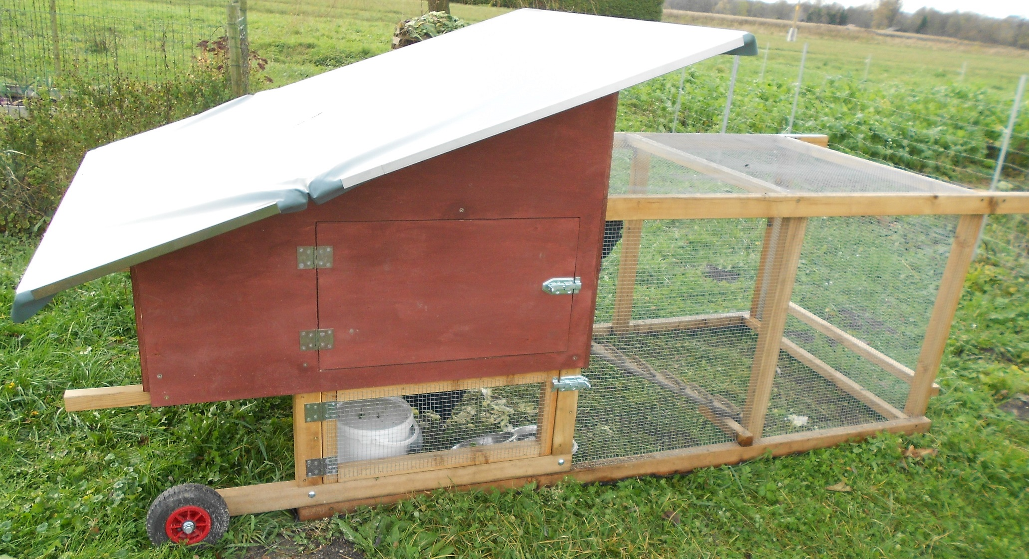 mobilni kokošnjak